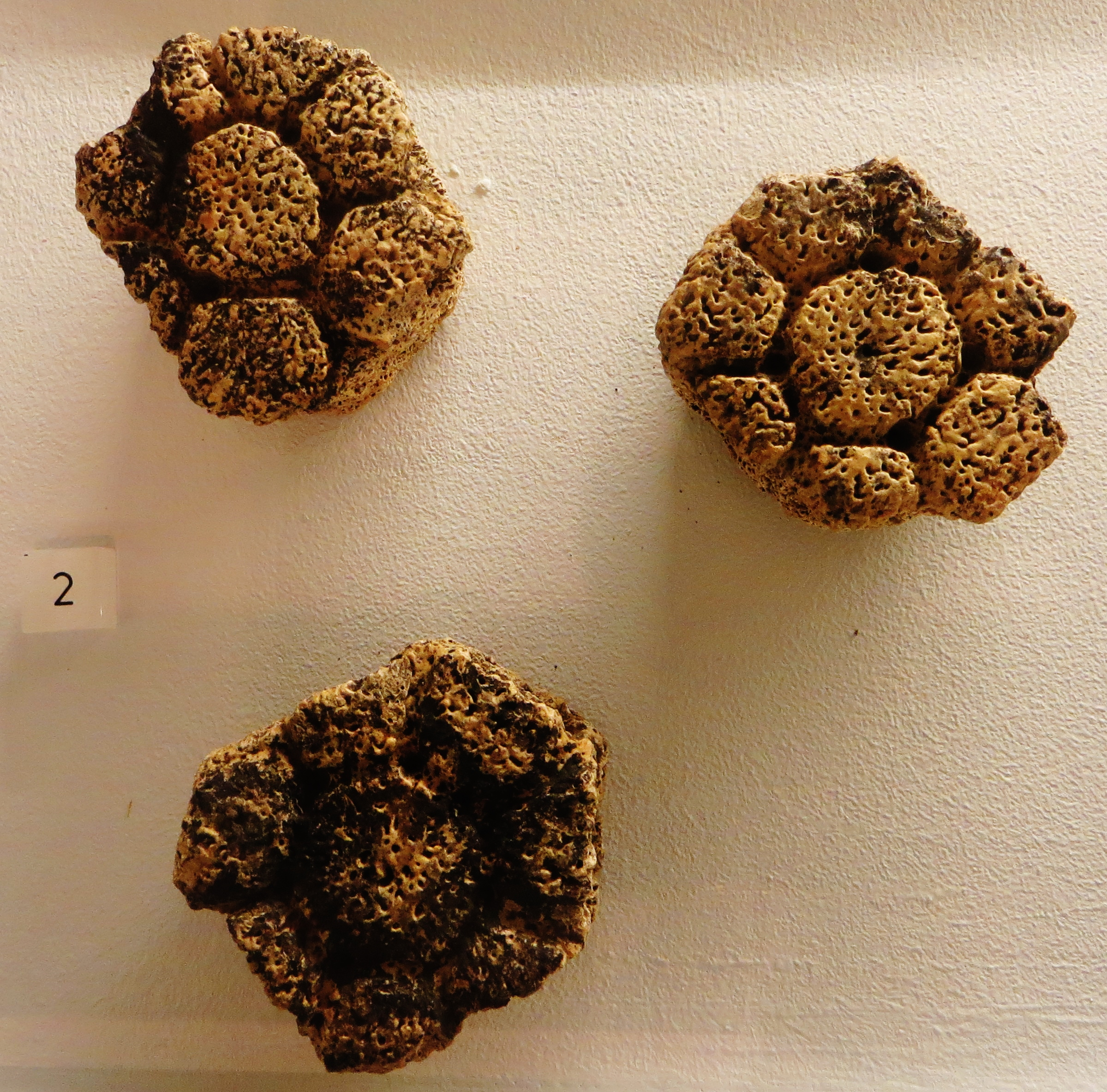 Fossil of Glyptodon, an extinct mammal - Took the picture at Museum of Paleontology of Tuebingen